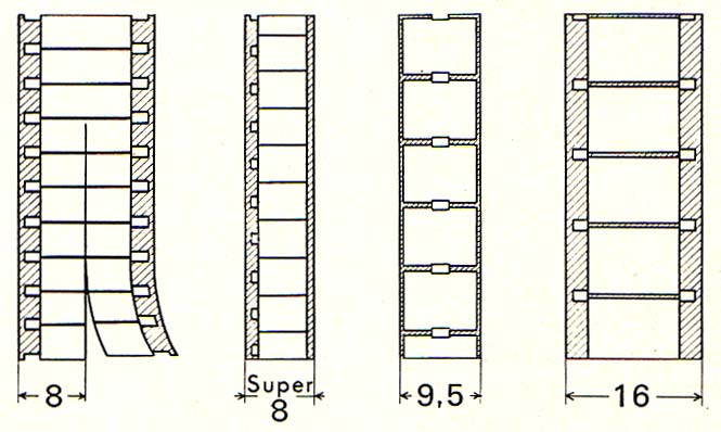 Distintos formatos de cine subestándar.